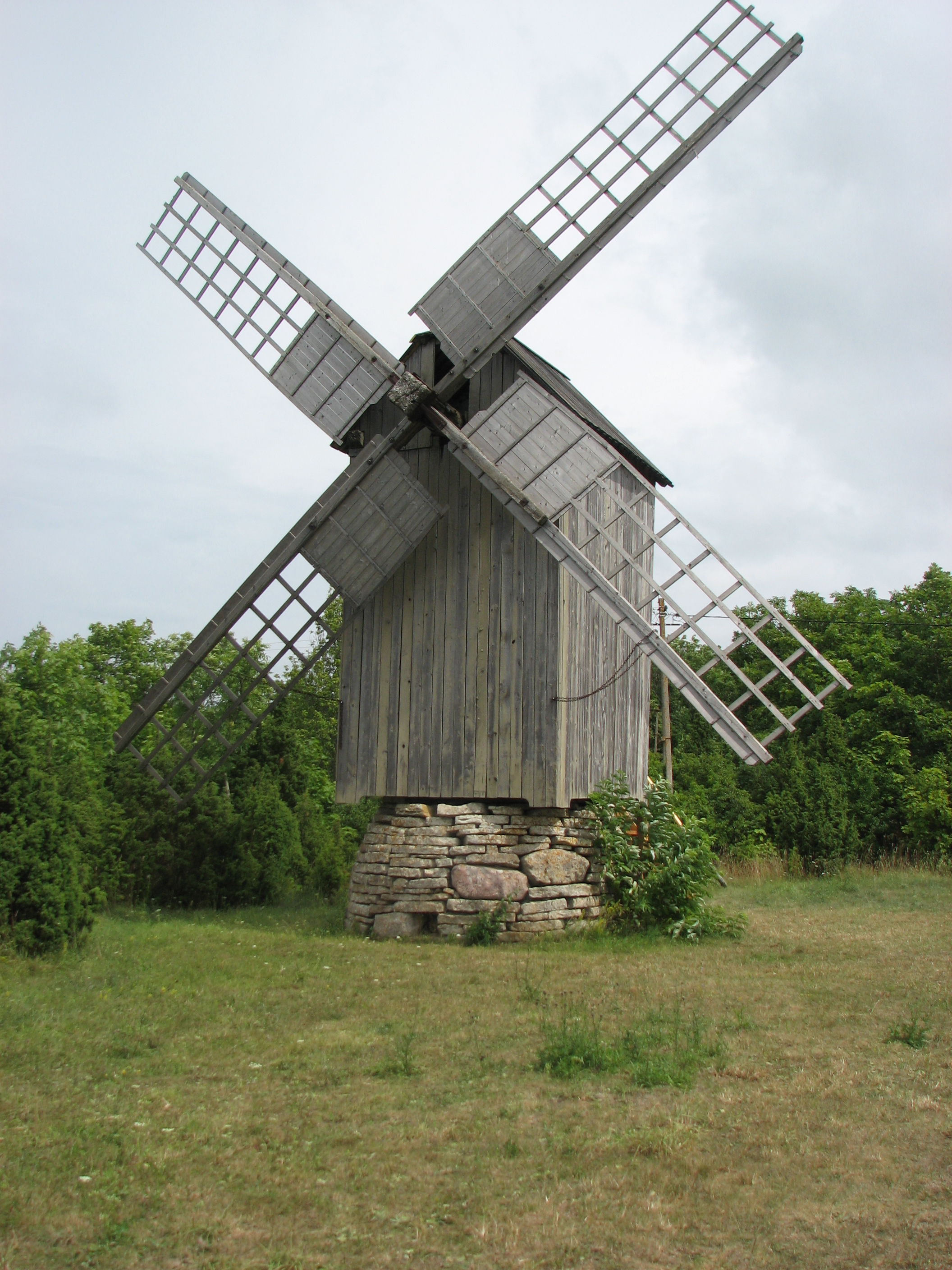 Tuuleveski Koguvas, J. Smuuli monumendi läheduses. Andruse talu tuulik.